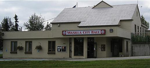 Wasilla City Hall in Alaska